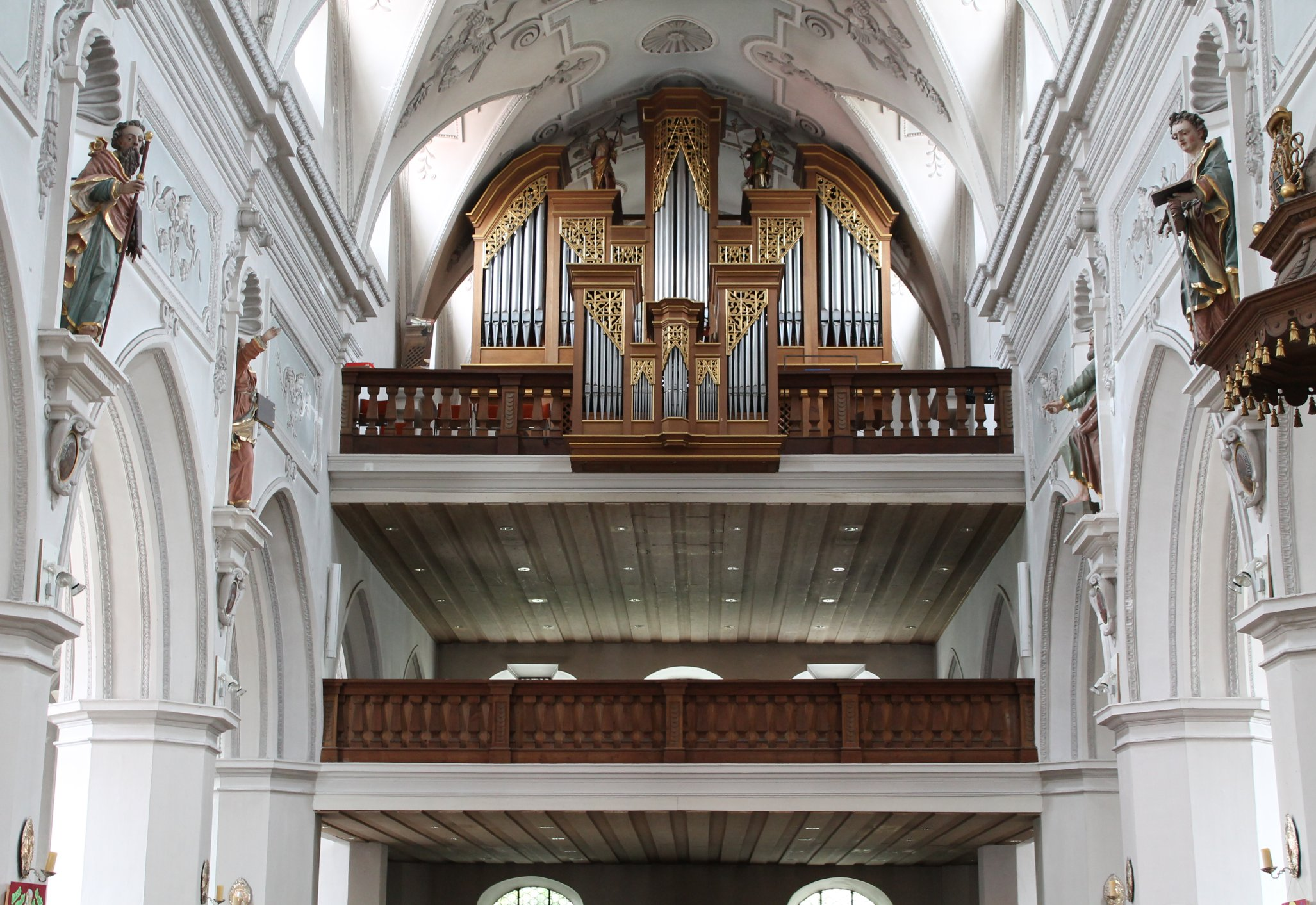 Orgel von St. Johannes Baptist in Pfaffenhofen a. d. Ilm (1976, H. Sandtner, III/40)